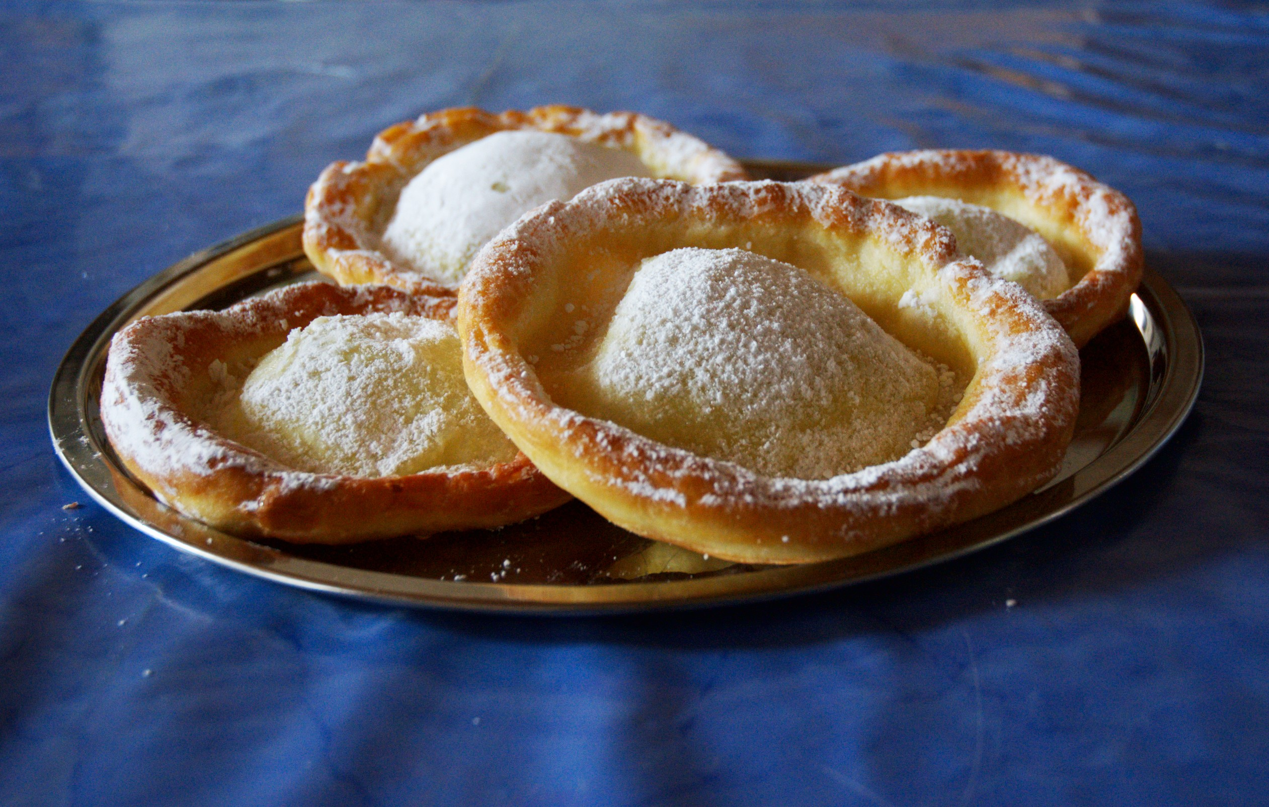 Fränkische Knieküchle